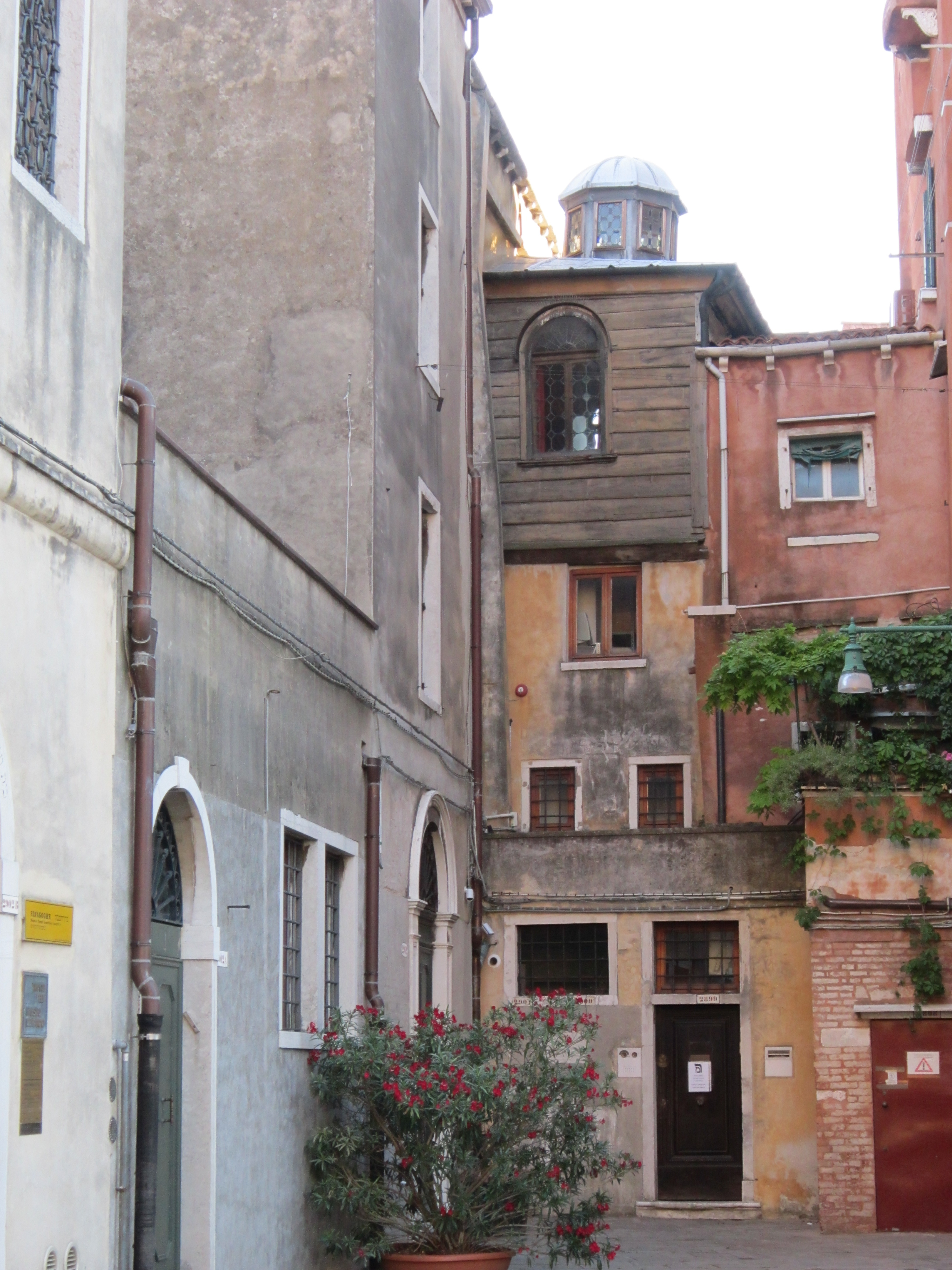 Venezia - La Schola Canton nel ghetto ebraico